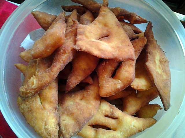 Bugnes dans le dauphiné